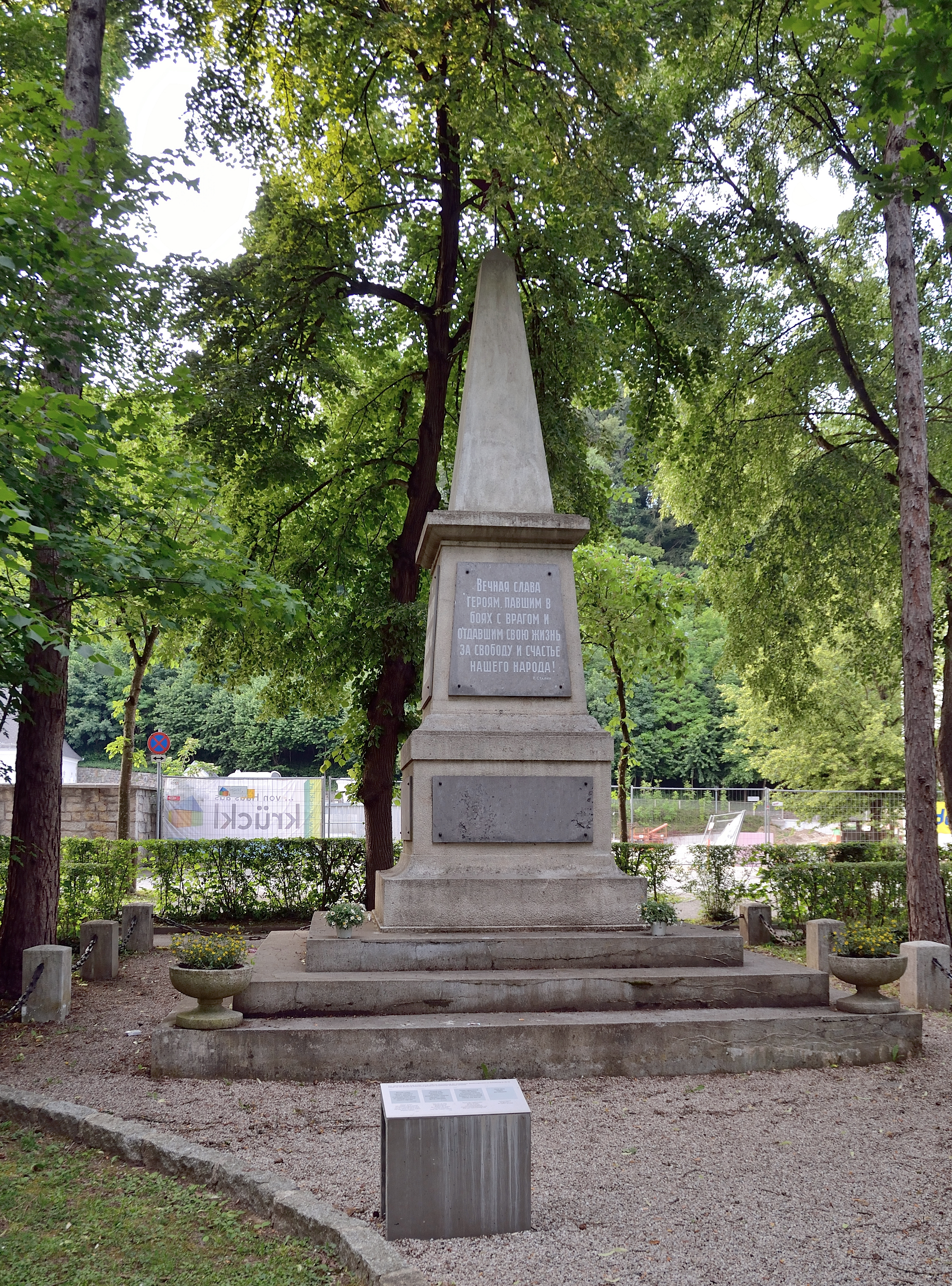 Das Denkmal für die Rote Armee wurde 1946 im heutigen Schulpark Amstetten errichtet.